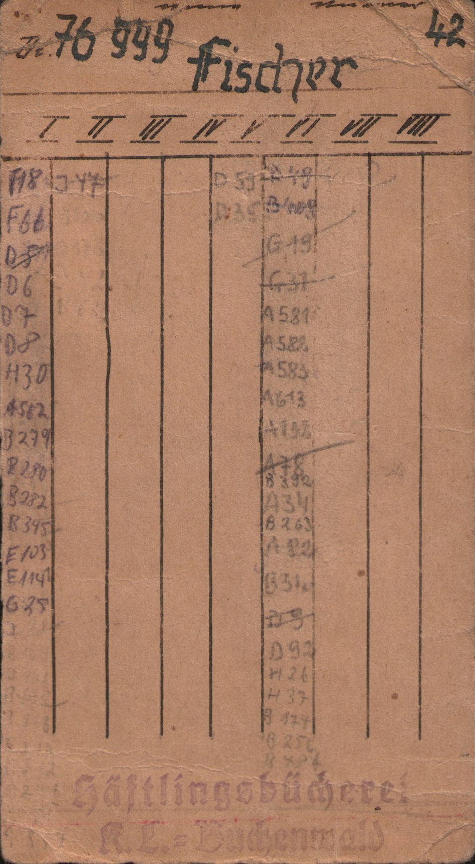 Entlehnkarte Häftlingsbücherei KZ Buchenwald, Karl Fischer, Häftlings-Nr. 76999, Block 42D. Das farbige Original befindet sich in Privatbesitz.